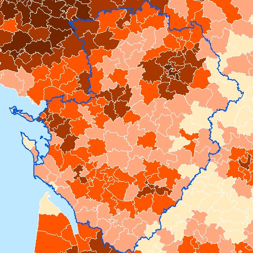 Carte de la part des moins de 25 ans dans la population de Poitou-Charentes, par canton Légende : Du plus clair au plus foncé : entre 16,1 et 22,8 % de la population a moins de 25 ans ; entre 22,8 et 26,4 % de la population a moins de 25 ans ; entre 29,7 et 33 % de la population a moins de 25 ans ; entre 33 et 44,9 % de la population a moins de 25 ans